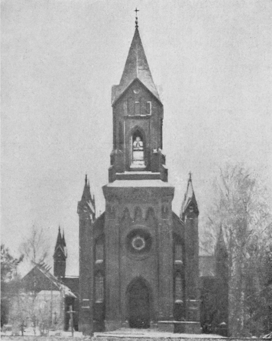 Беларуская (тарашкевіца): Івянец (Ivianiec), вуліца Ракаўская (vulica Rakaŭskaja). Касьцёл Сьвятога Аляксея